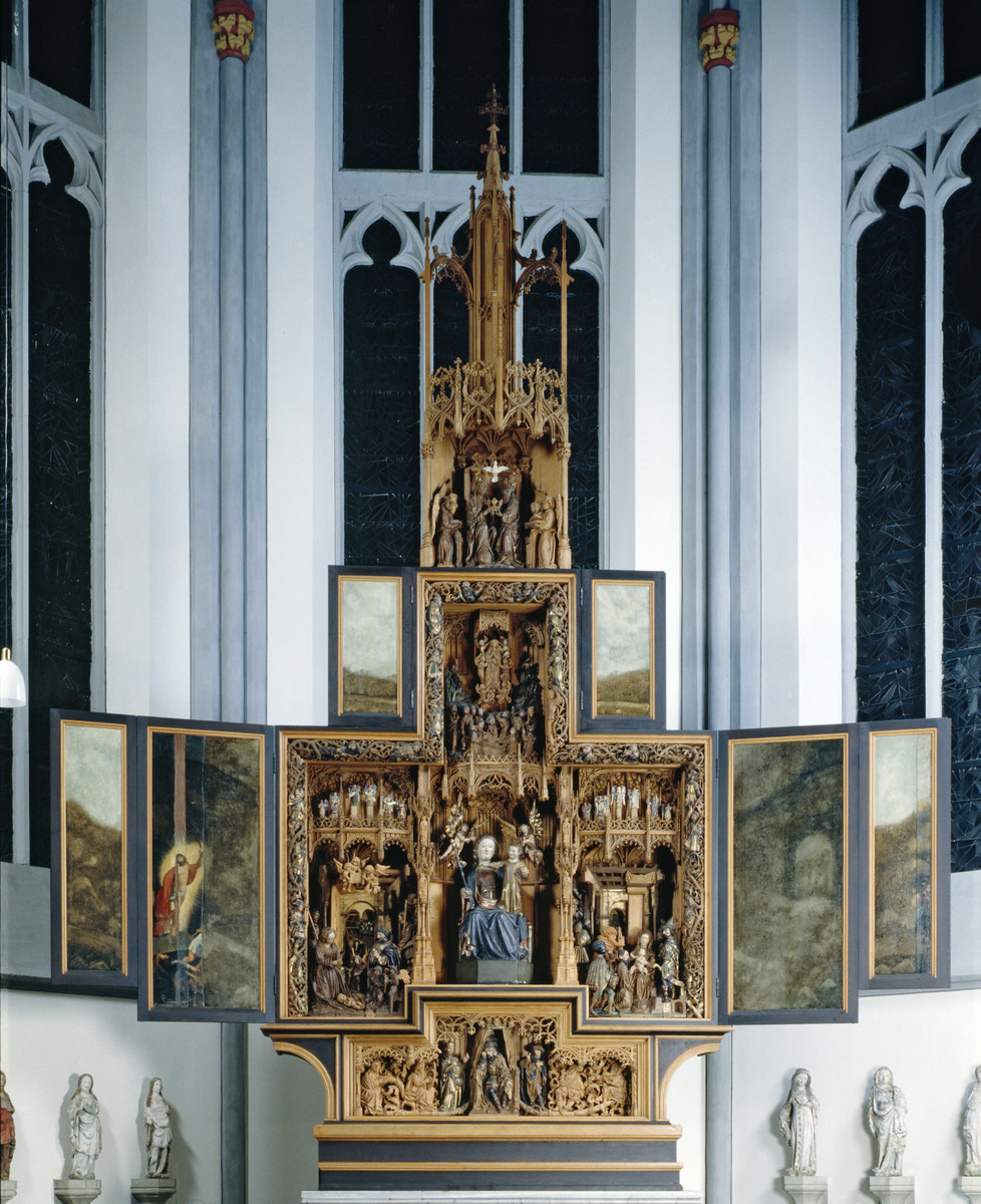 Douverman - Autel de Marie Clèves